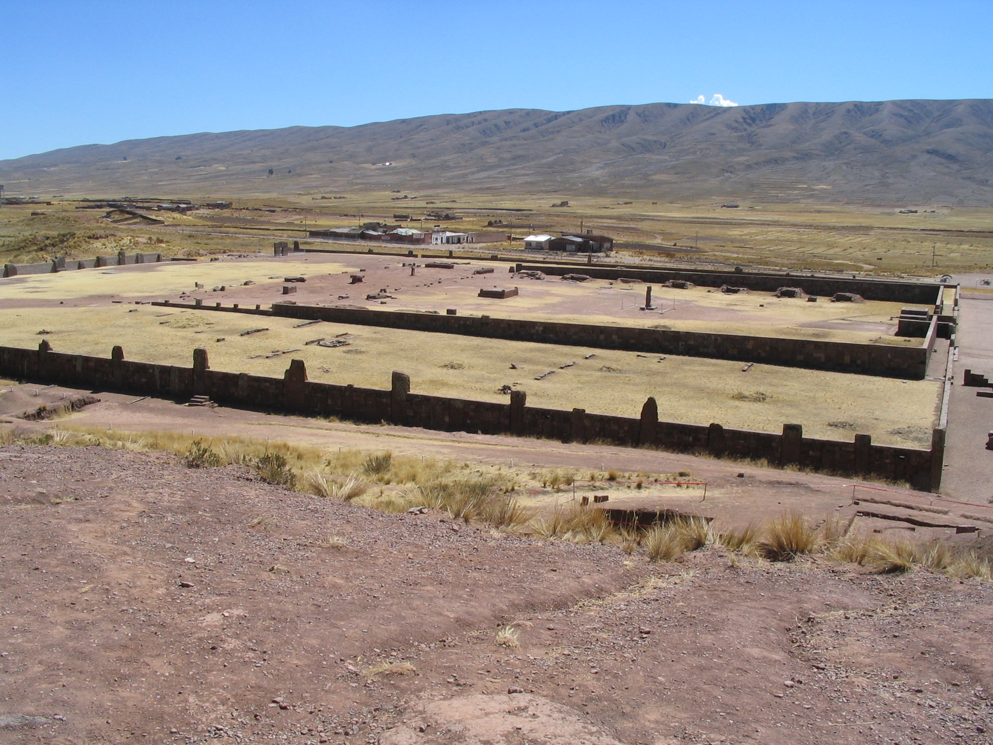 Photo du temple "Kalasasaya" de l'ancienne civilisation "Tiwanaku" en Bolivie Photo prise pas User:Anakin en 2005.